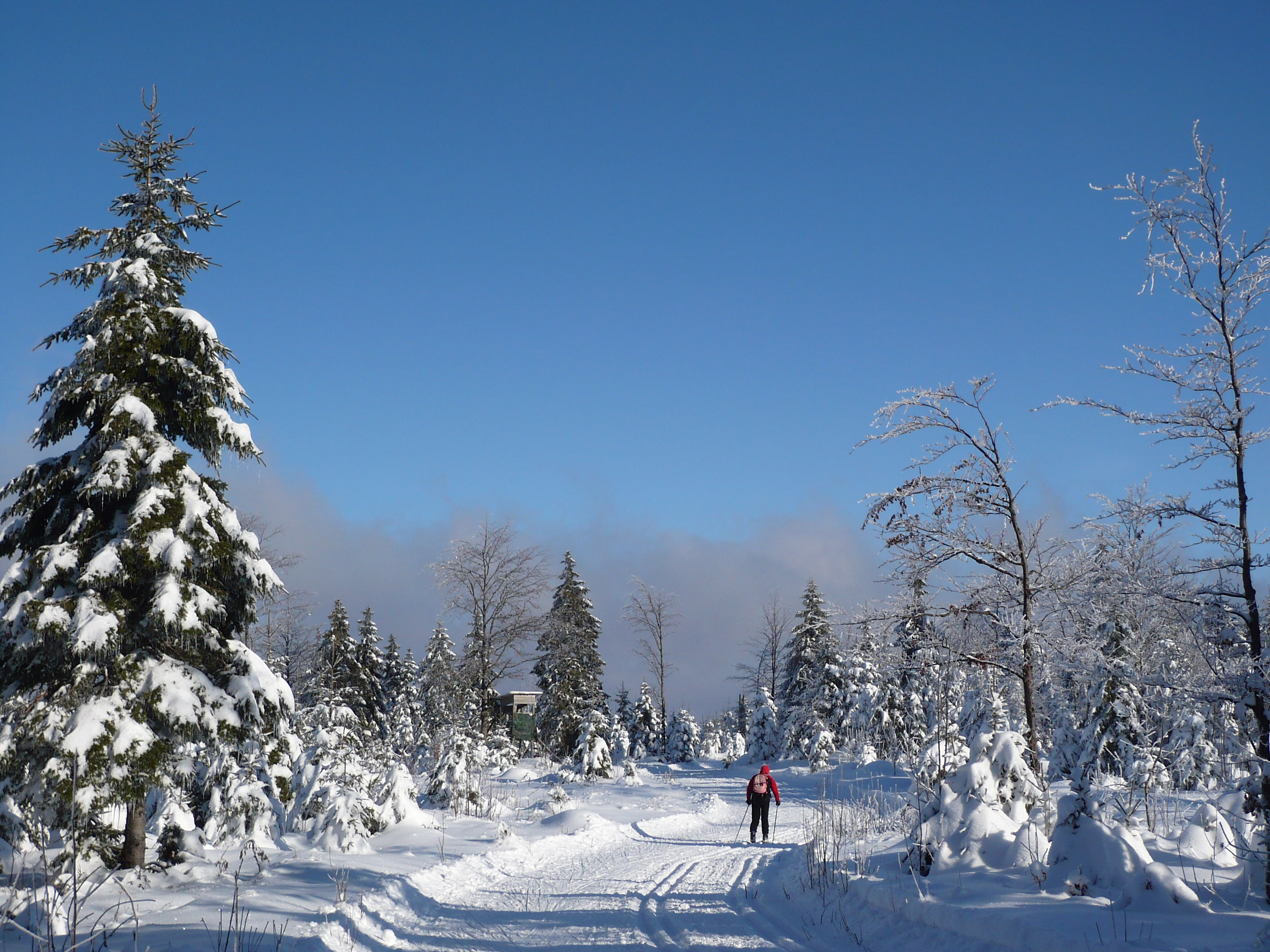 Schauinslandspur